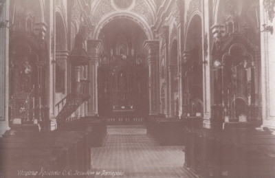 Костел єзуїтів у Тернополі: внутрішній вигляд